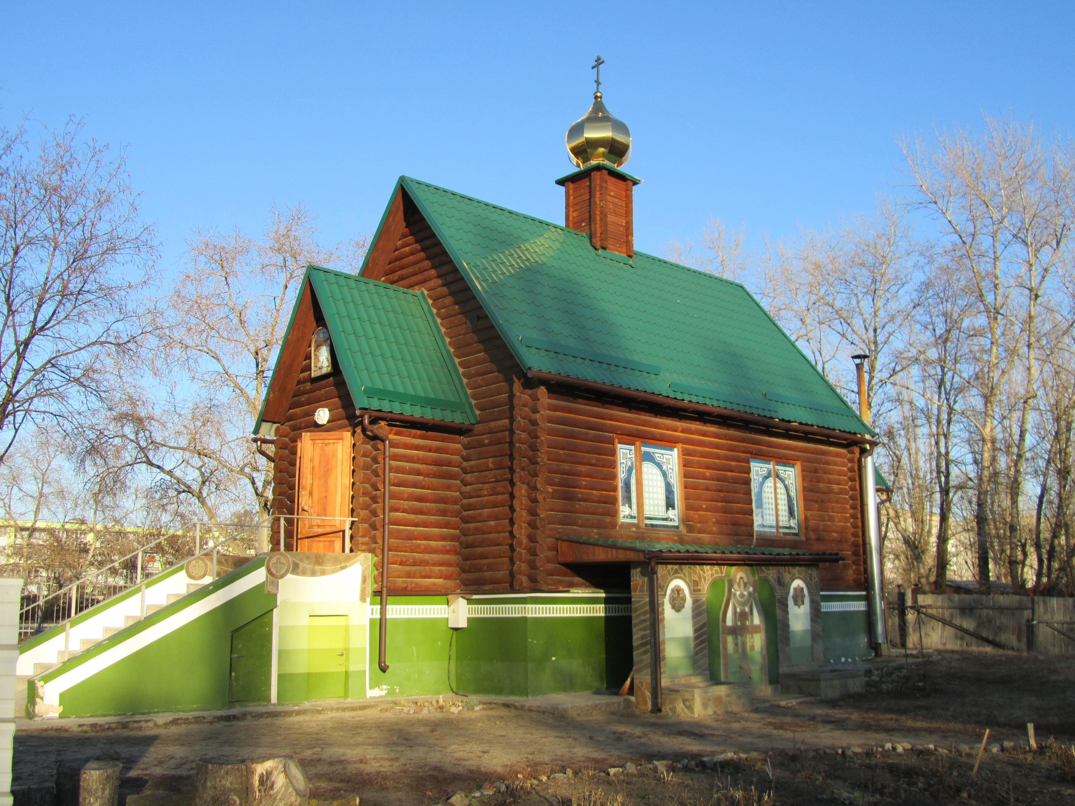 Свято-Пантелеймонська церква у Кременчуці